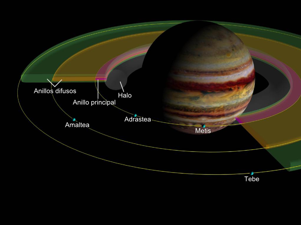 Diagrama que muestra los anillos de Júpiter y sus satélites interiores.